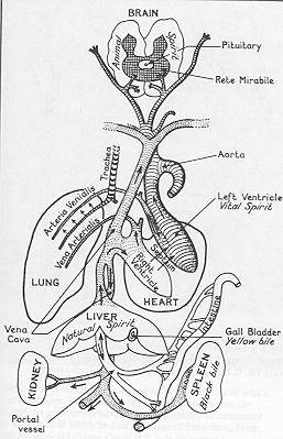 Anatominiai Galeno piešiniai